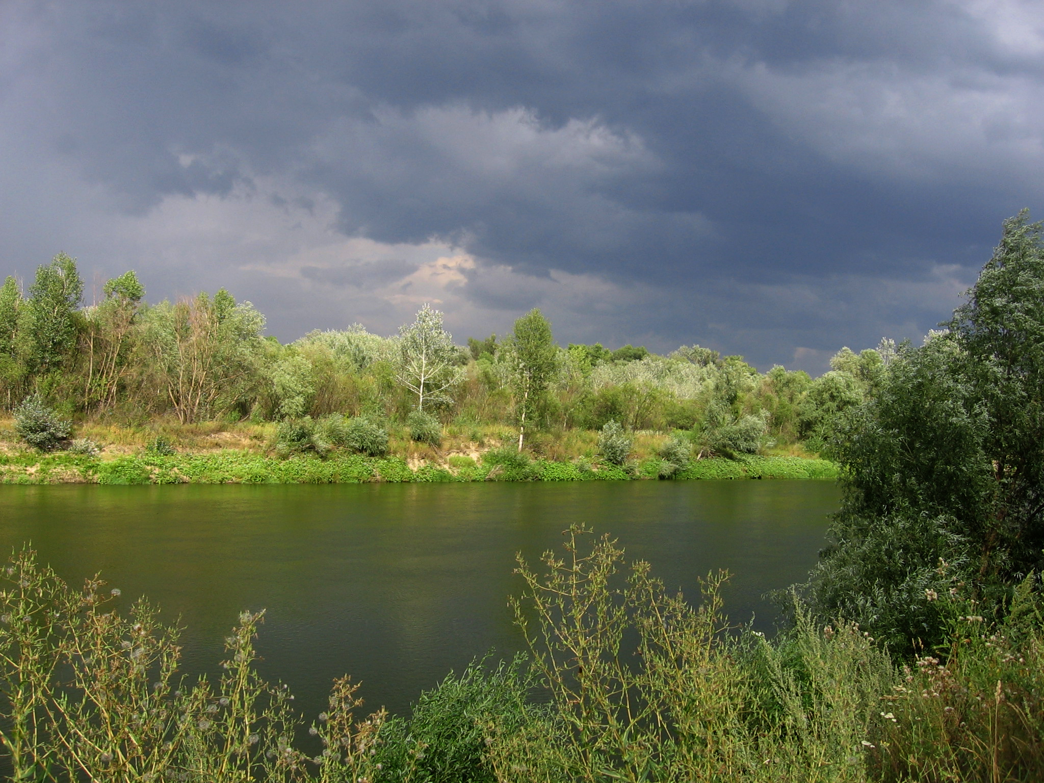 Новохопёрск Воронежской области. Хоперский государственный заповедник. Река Хопёр.